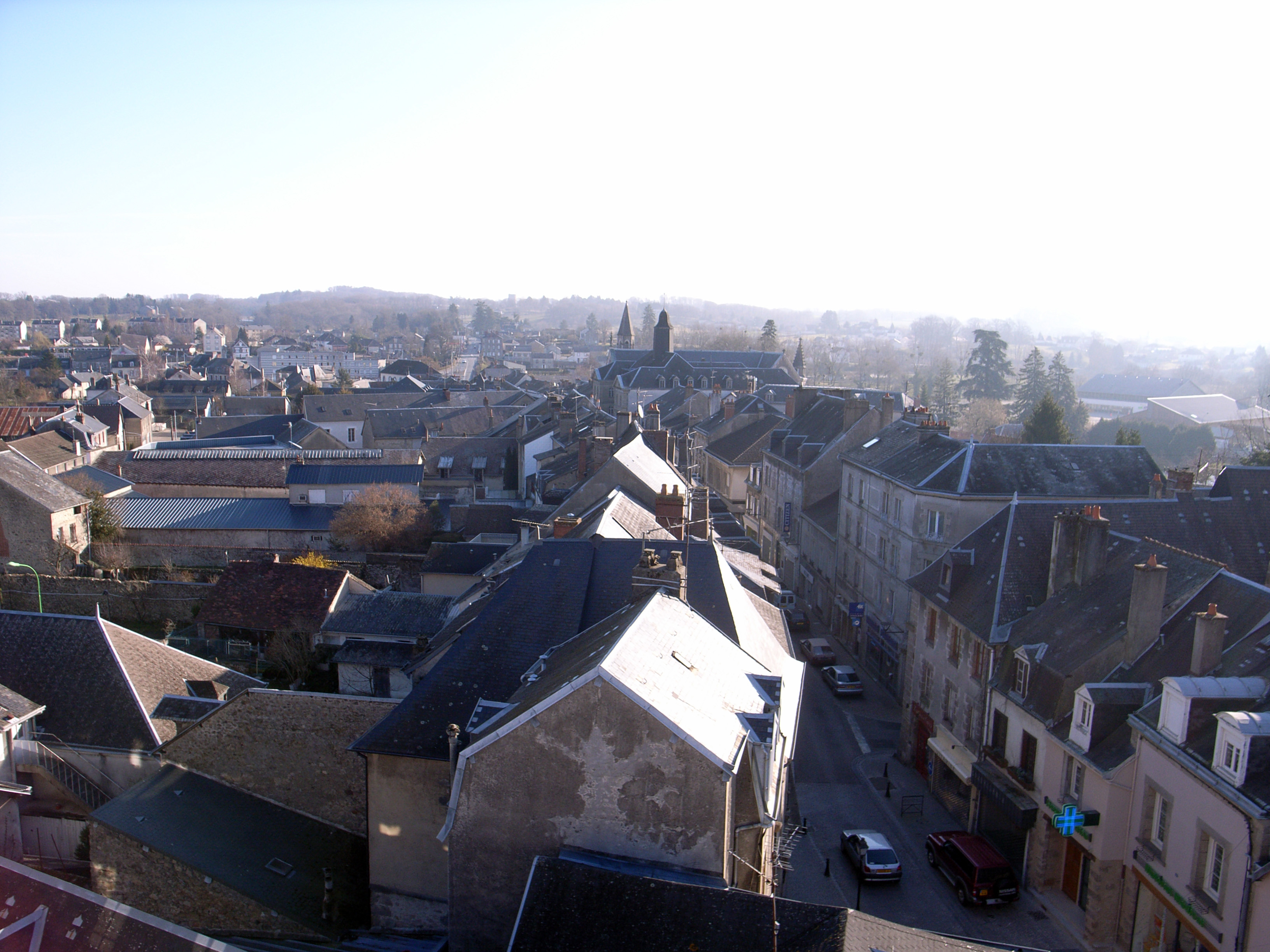 Vue sur La Souterraine, Creuse, France